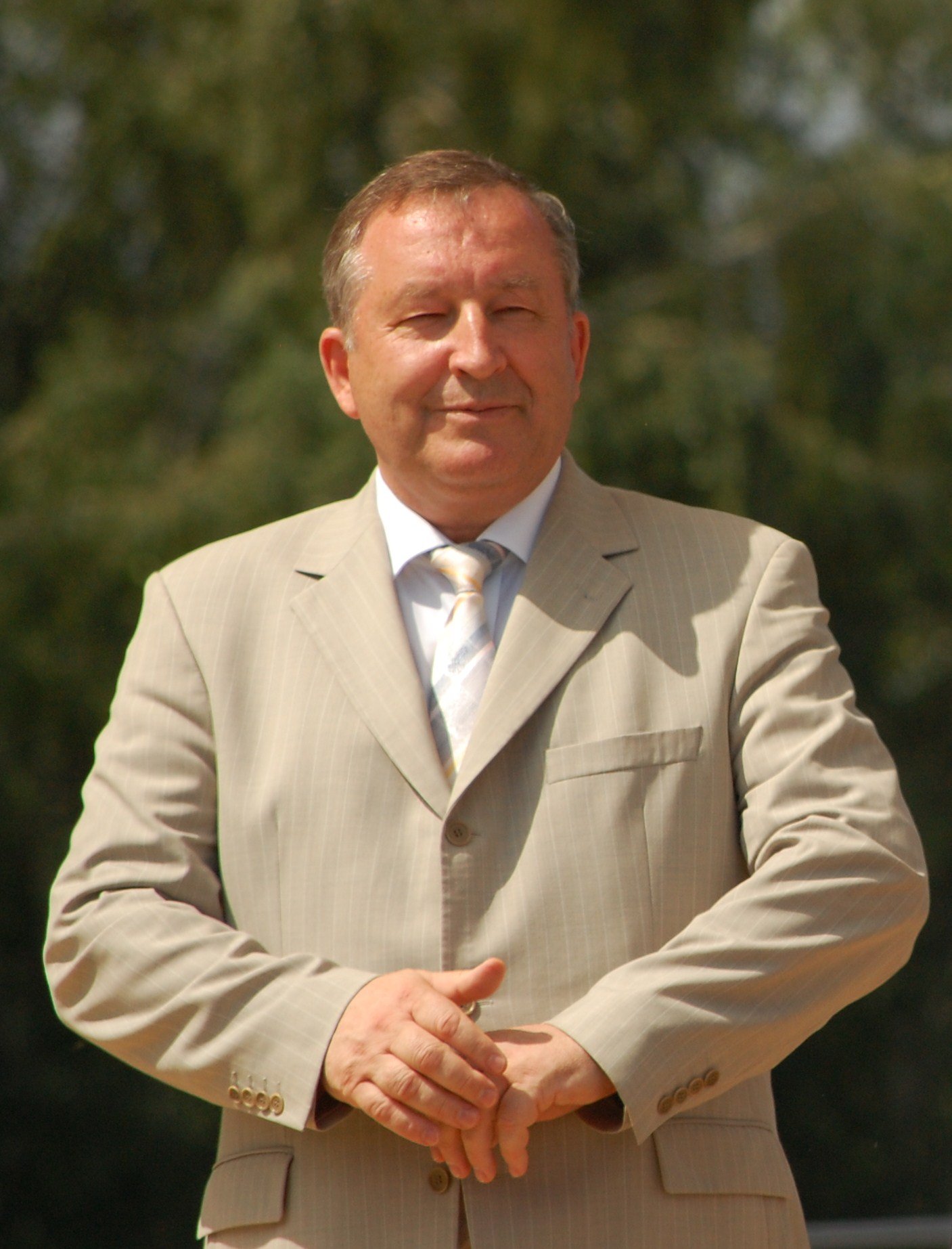 Александр Богданович Карлин, губернатор Алтайского края